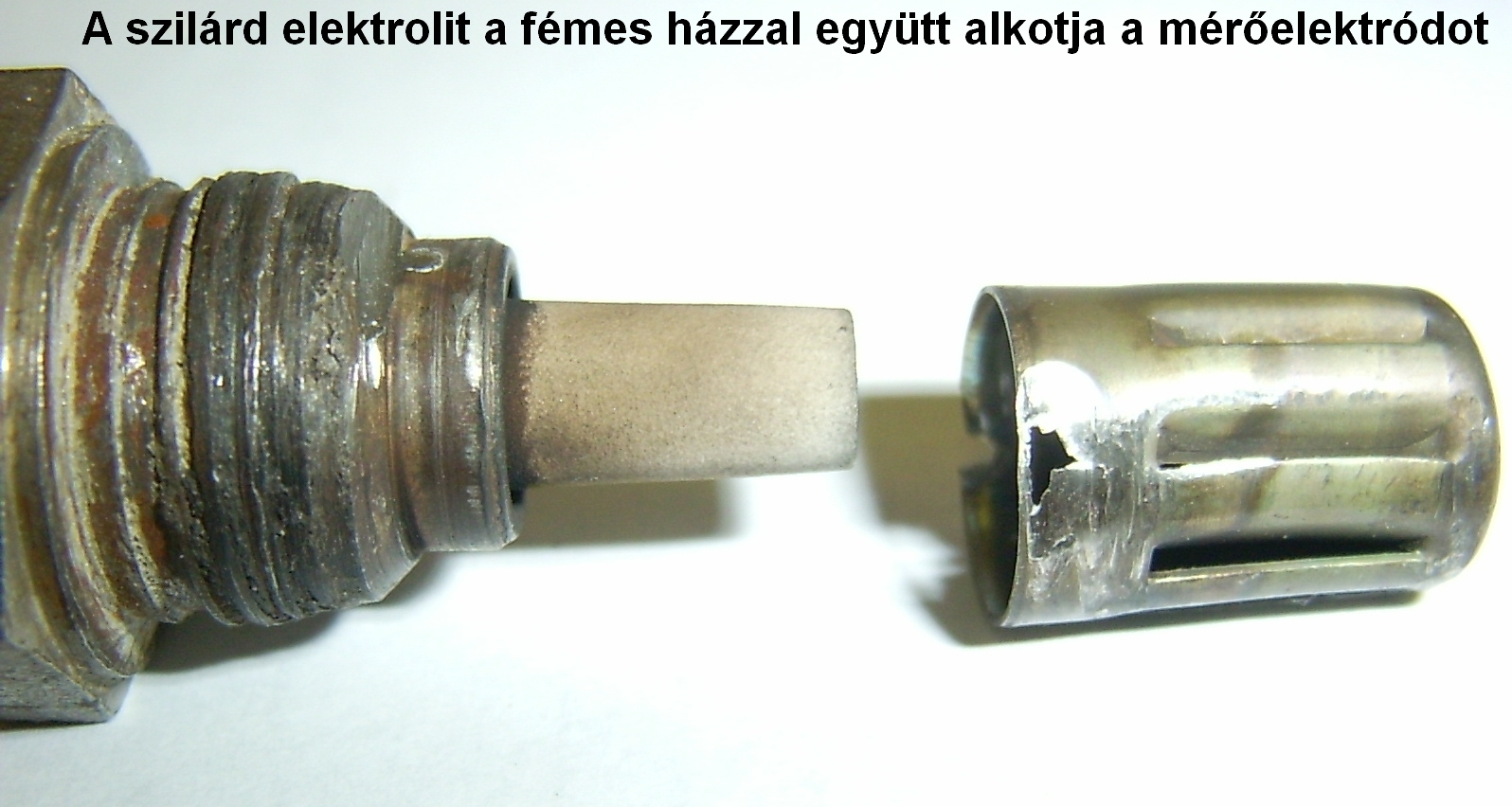 Gépkocsi kipufogórendszerébe építhető lambda-szonda (oxigénszenzor) A lambda-szonda alkatrészei: 1 szilárd elektrolit, 2 ház (negatív elektród, mérőelektród), 3 belső elektród-kivezetés (pozitív elektród, referencia-elektród), 4 védősapka Saját felvétel, 09.05.2005. Szerző: Dr. Báder Imre